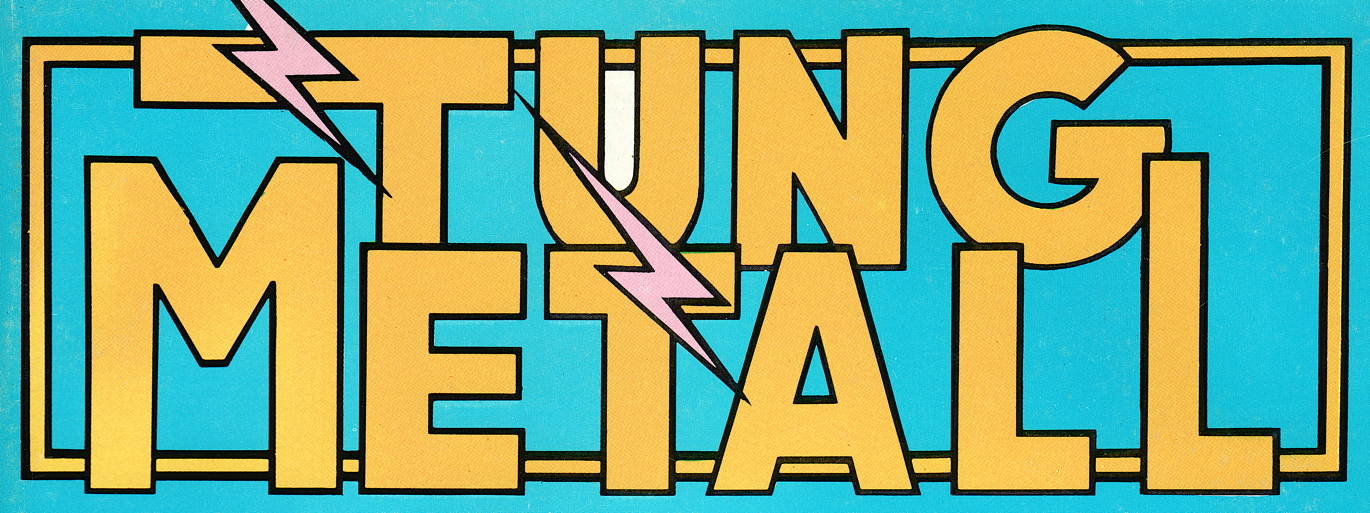 Omslagstiteln till tidningen Tung Metall (Tungmetall) 9/1987.